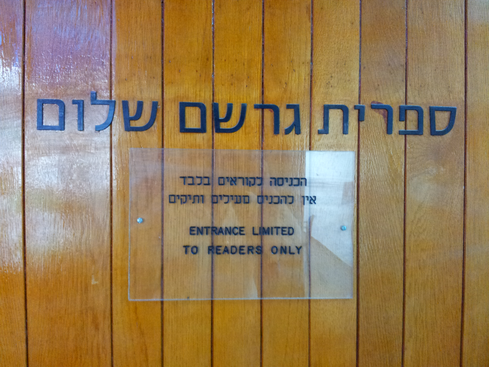 שלט על דלת העץ של ספריית גרשם שלום בתוך הספריה הלאומית בירושלים